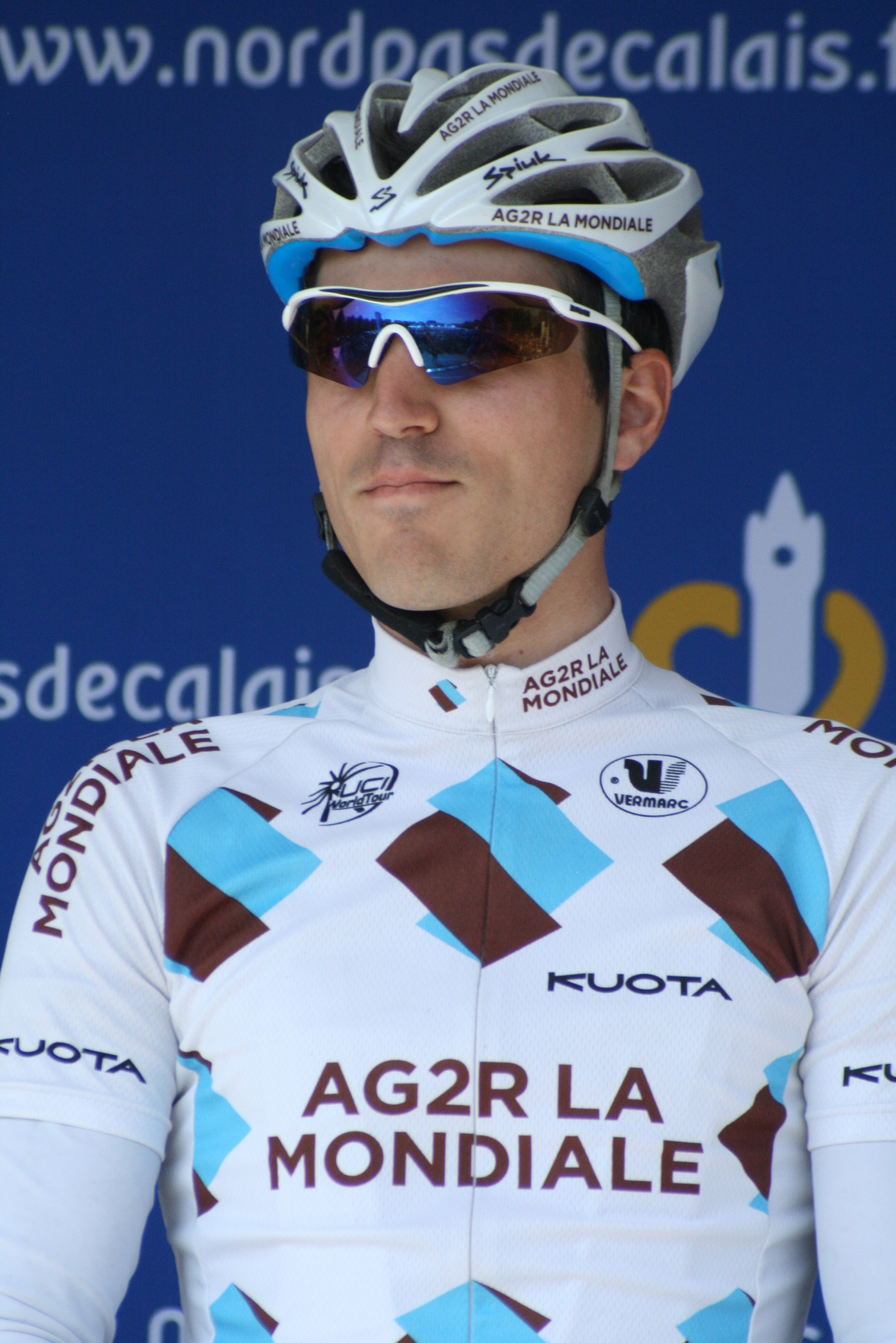 Présentation des coureurs au départ de la première étape Romain Lemarchand